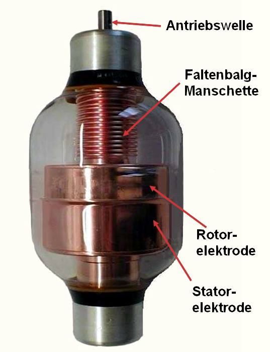 variabler Vacuumkondensator mit Beschreibung